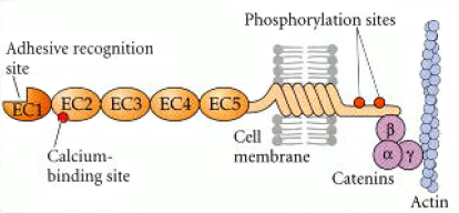 Estructura de la cadherina.